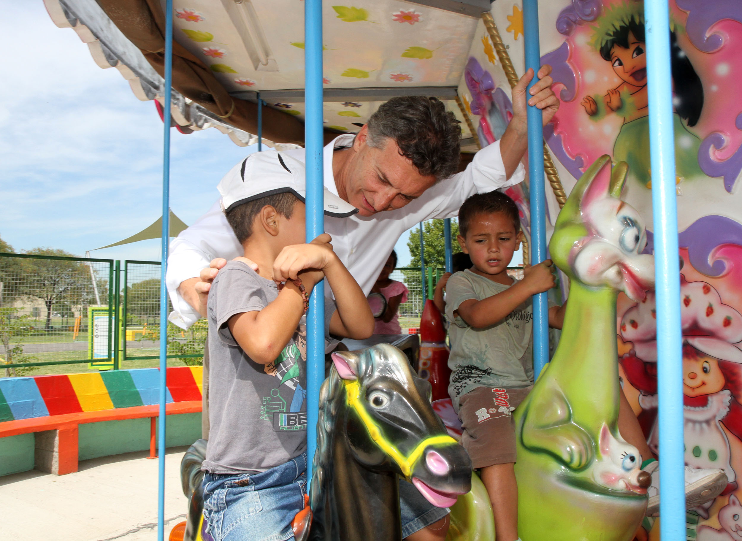 Buenos Aires, 13 de Febrero de 2013. El jefe de Gobierno de la Ciudad de Buenos Aires, Mauricio Macri, presentó hoy los nuevos juegos de agua del Parque Indoamericano, en un acto que compartió con la dirigente social Margarita Barrientos. Fotos: Sandra Hernandez/GCBA